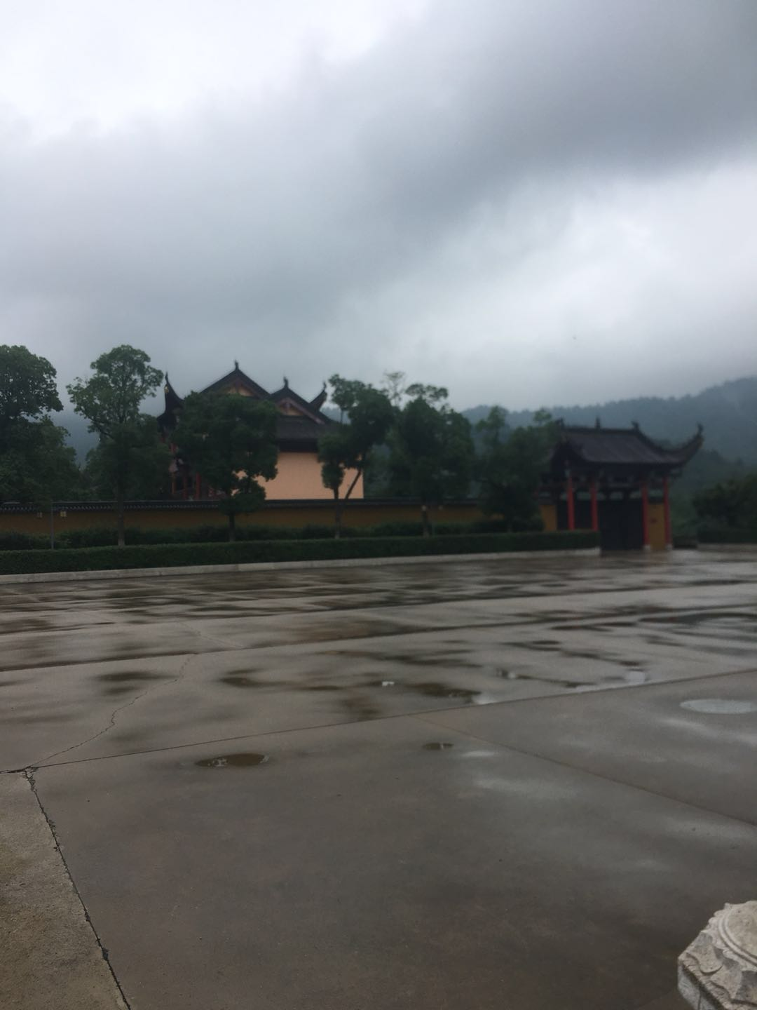 中文（中国大陆）: 敬亭山的图片3